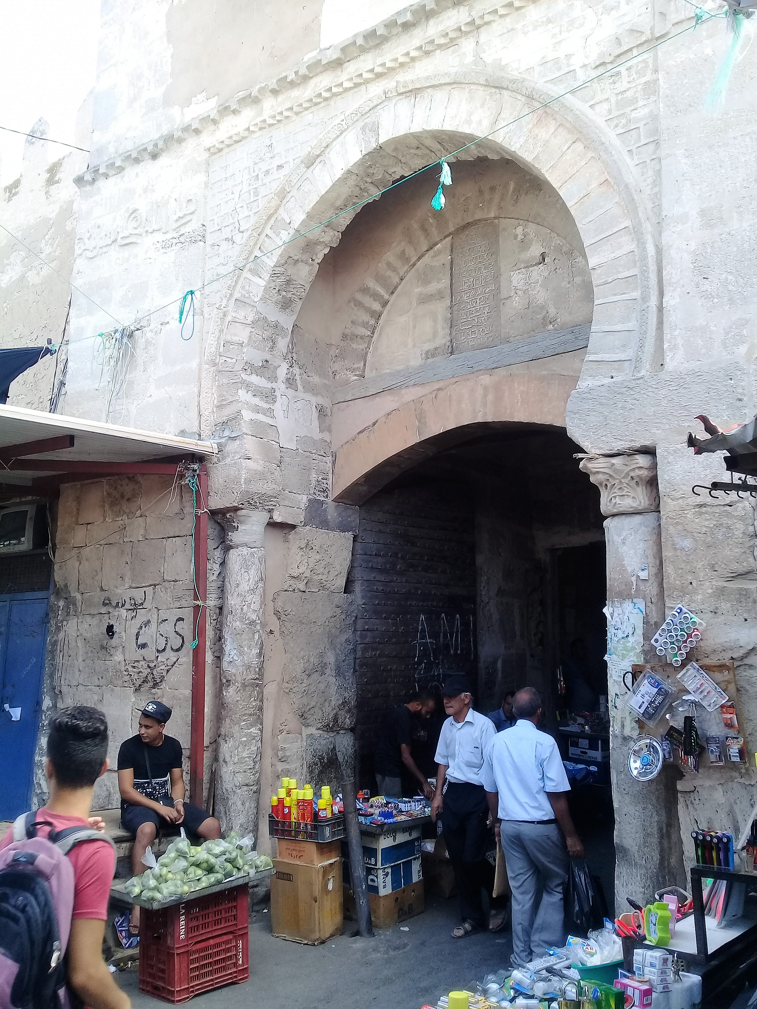 Bab Jebli - vue d'ensemble